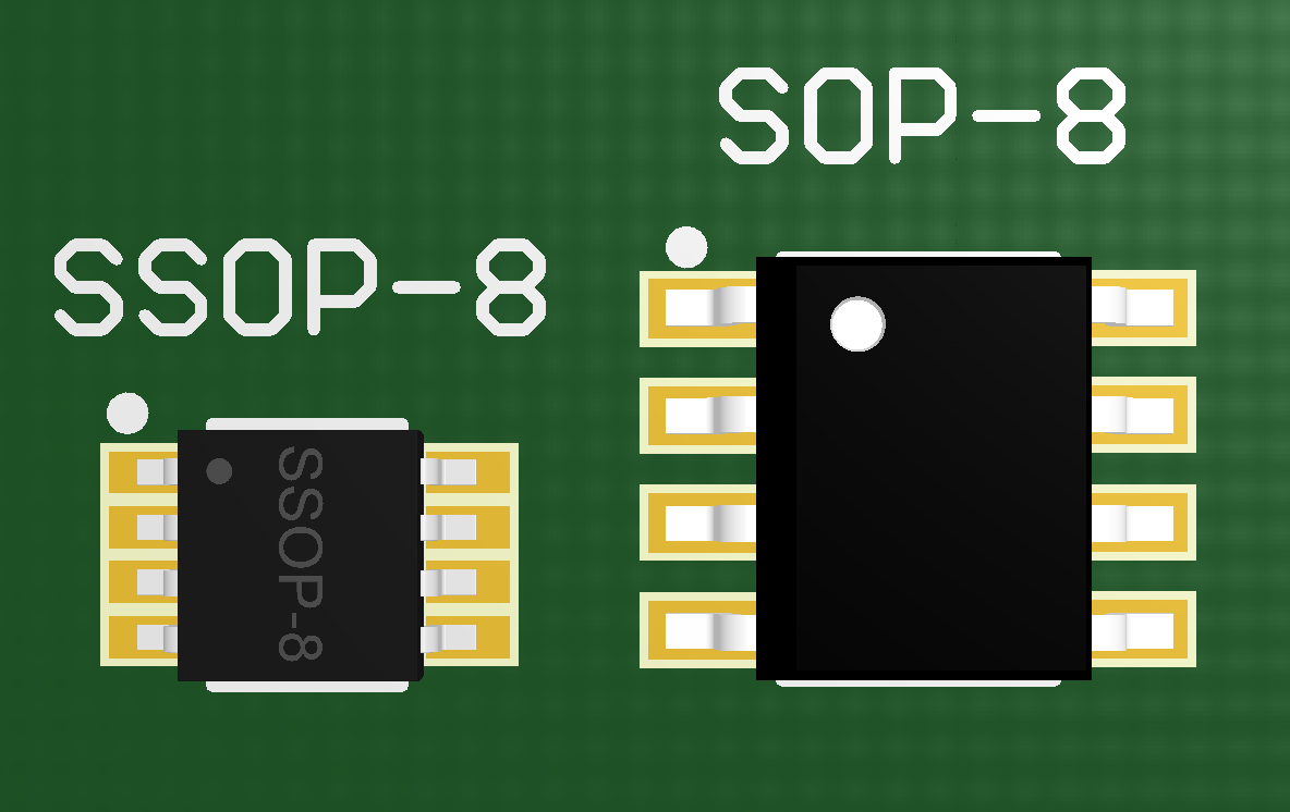 Габаритные размеры корпусов типа SOP-8 и SSOP-8